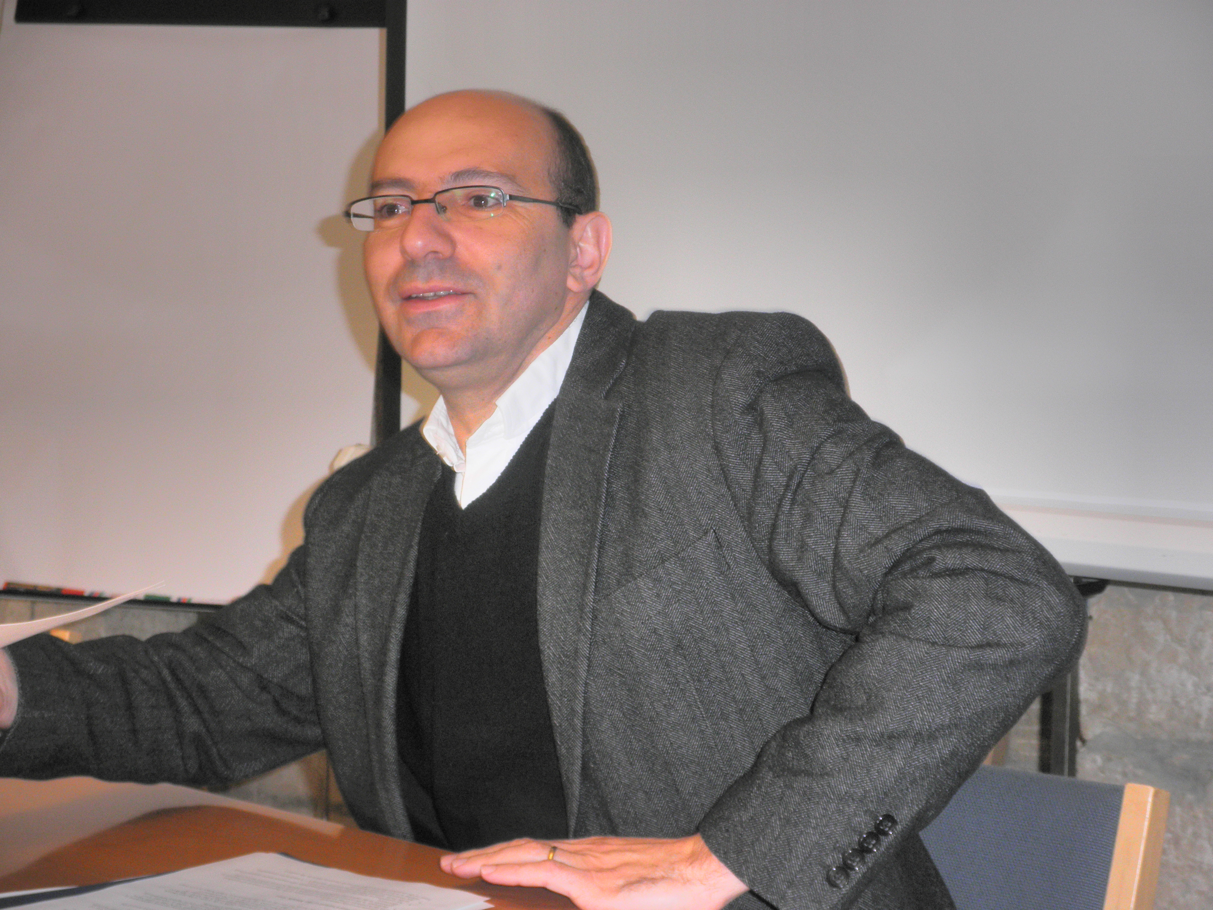 Dr. Mitri Raheb, Evangelisch-Luthers theoloog in Bethlehem